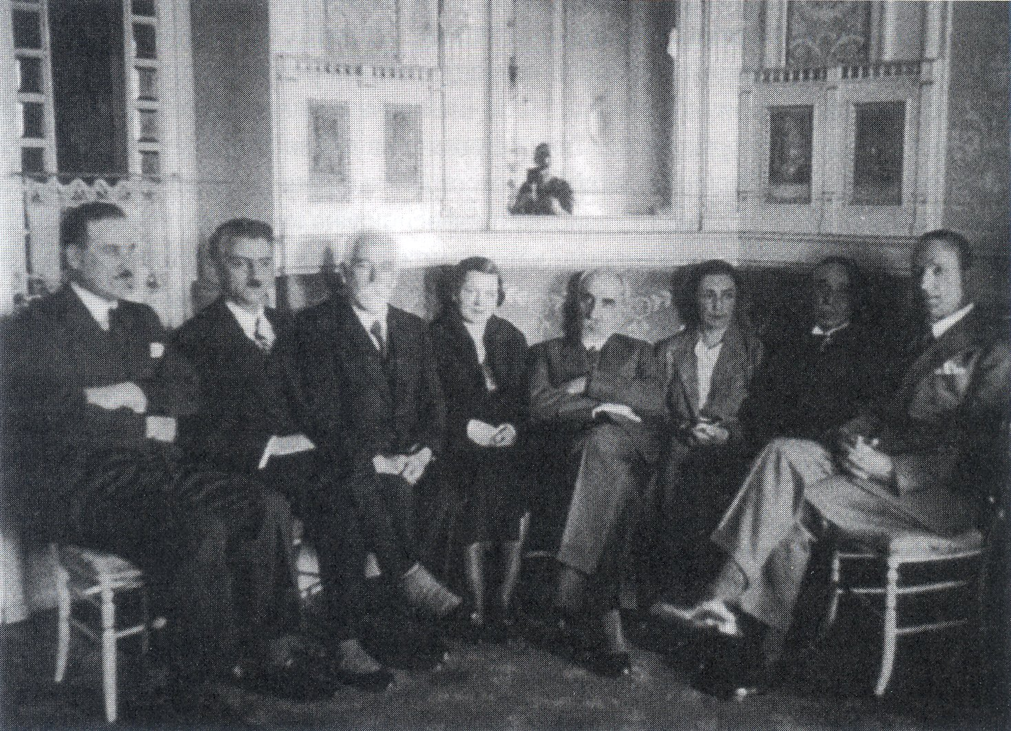 Българската делегация на сесията на Обществото на народите в Женева през 1931 година